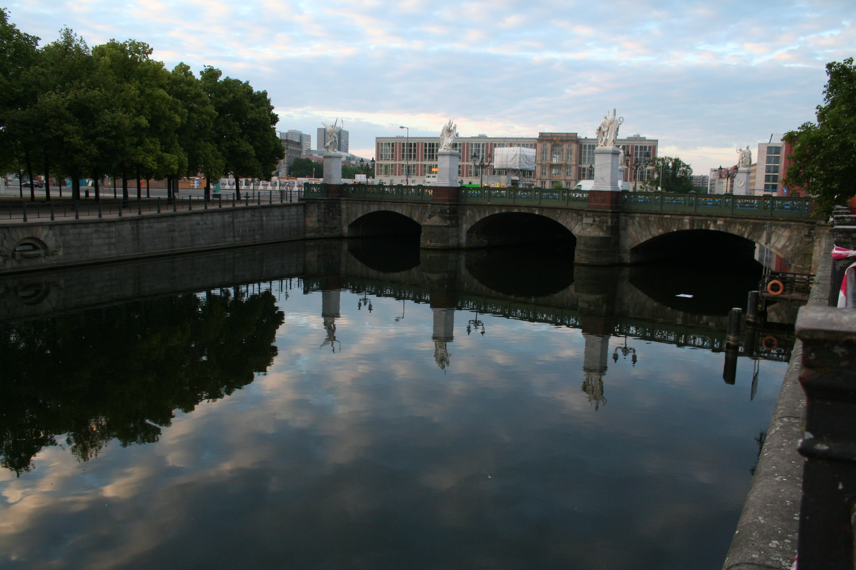 Die Schloßbrücke vom Kupfergraben aus betrachtet in den frühen Morgenstunden des Sommers.This is a photograph of an architectural monument.